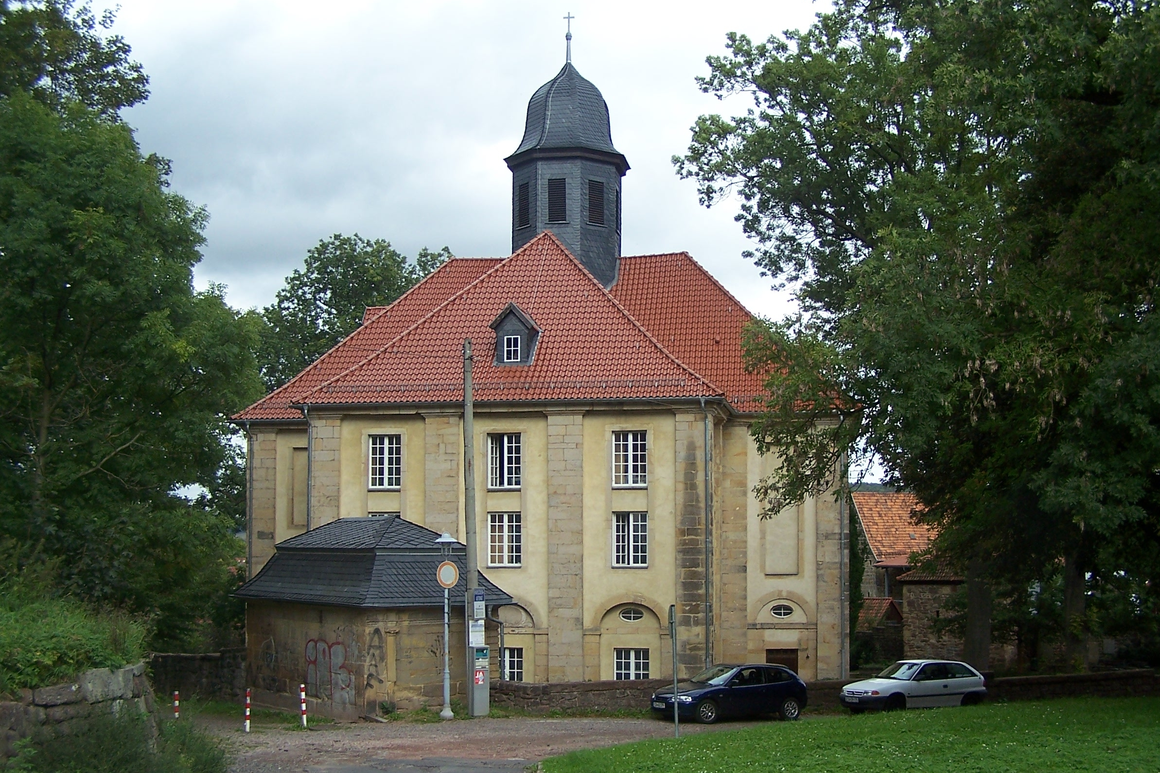 Ansicht von Südosten. Bei der letzten Sanierung der Kirche wurde auch eine Neueindeckung des Kirchenschiffes vorgenommen.